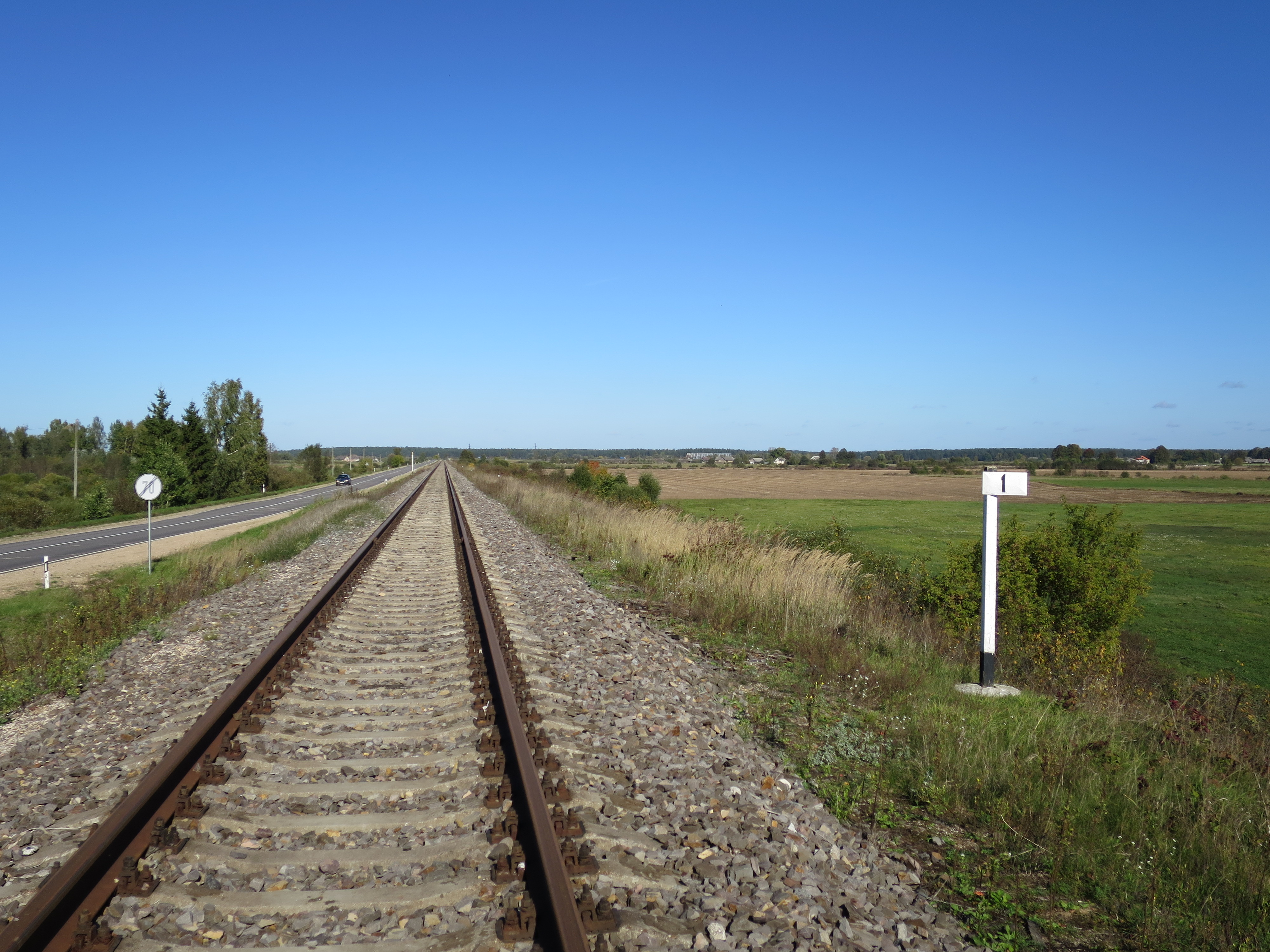 Daugavpils apvedceļa līnija